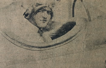 El Aviador cucuteño Camilo Daza.